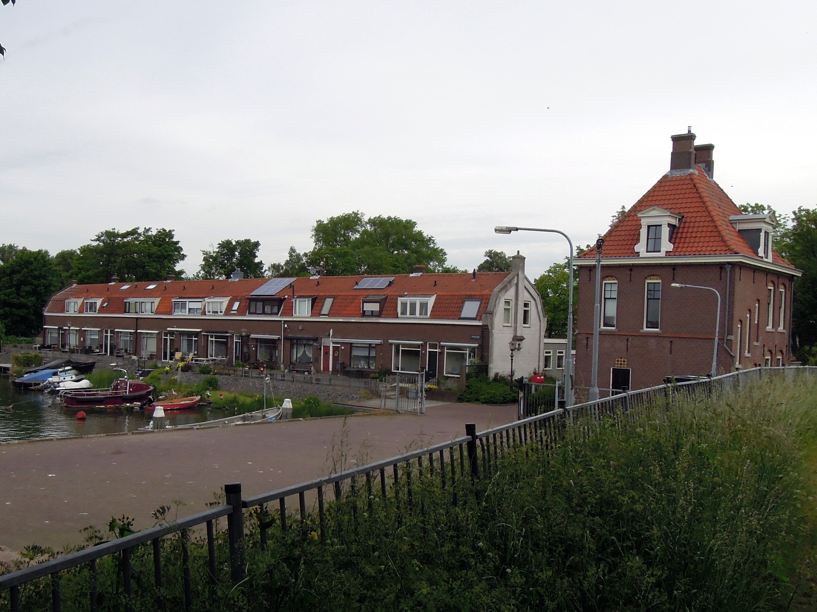 Woningen sluisknechten en voormalig telegraaf- en hulppostkantoor bij de Oranjesluizen bij Schellingwoude